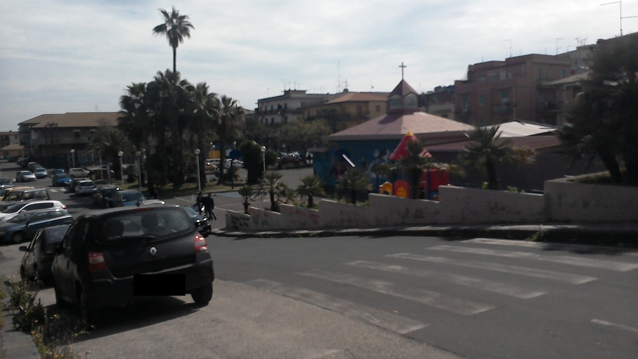 Piazza Enrico Berlinguer a Lineri, con a destra, la chiesa di San Bernadette.